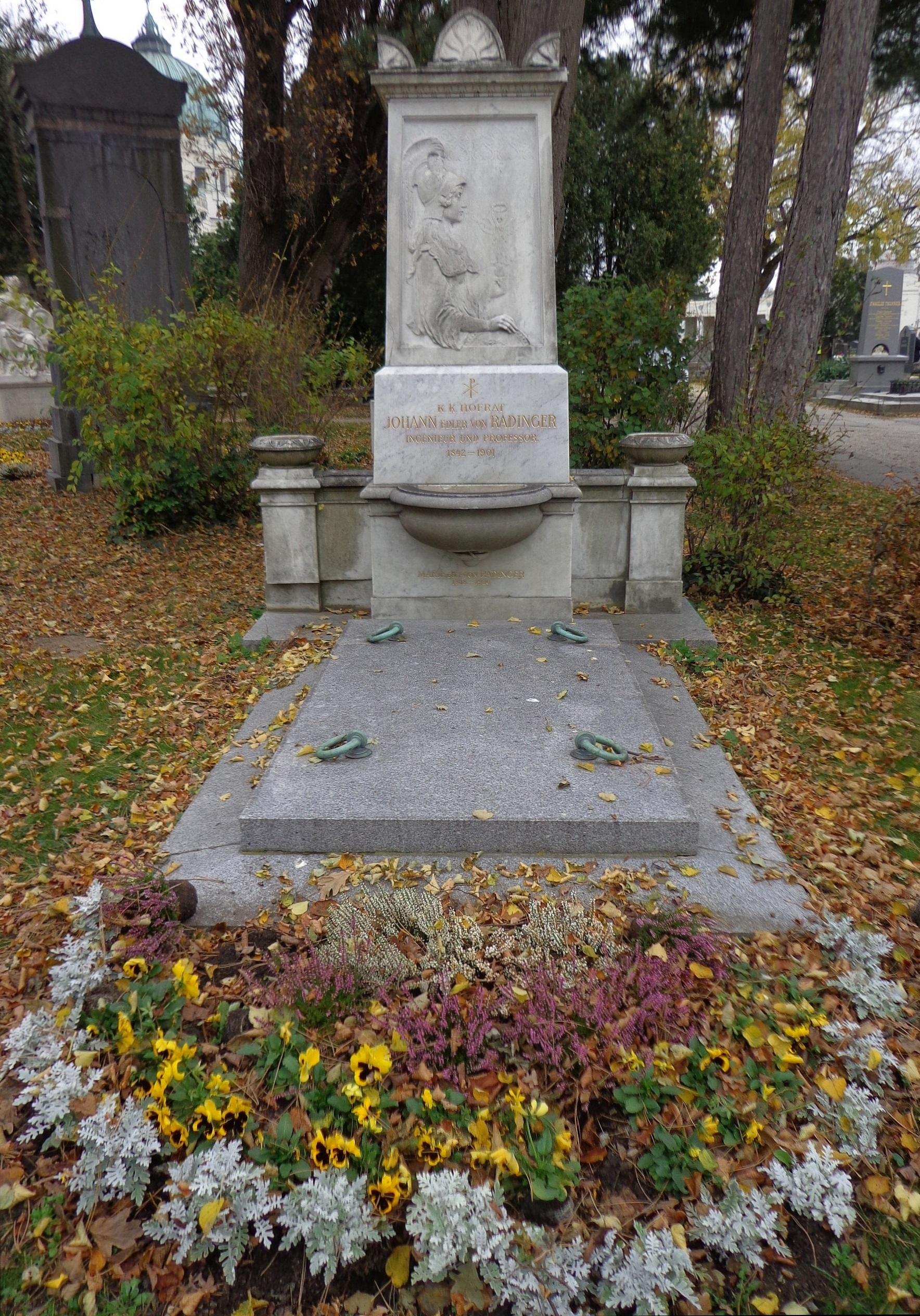 Wiener Zentralfriedhof - Gruppe 14A, Ehrengrab von Johann von Radinger